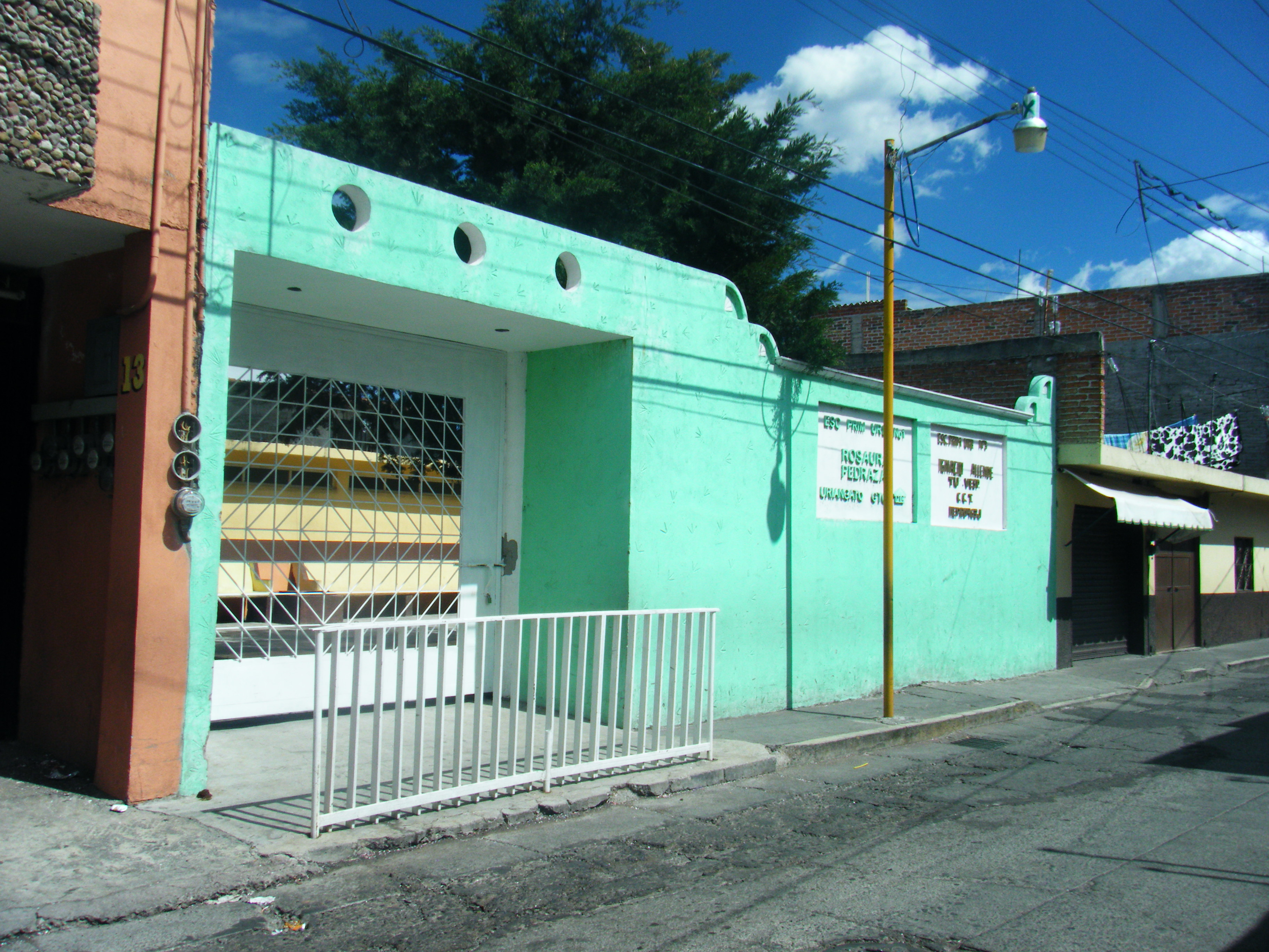 Escuela Rosaura Pedraza en Uriangato